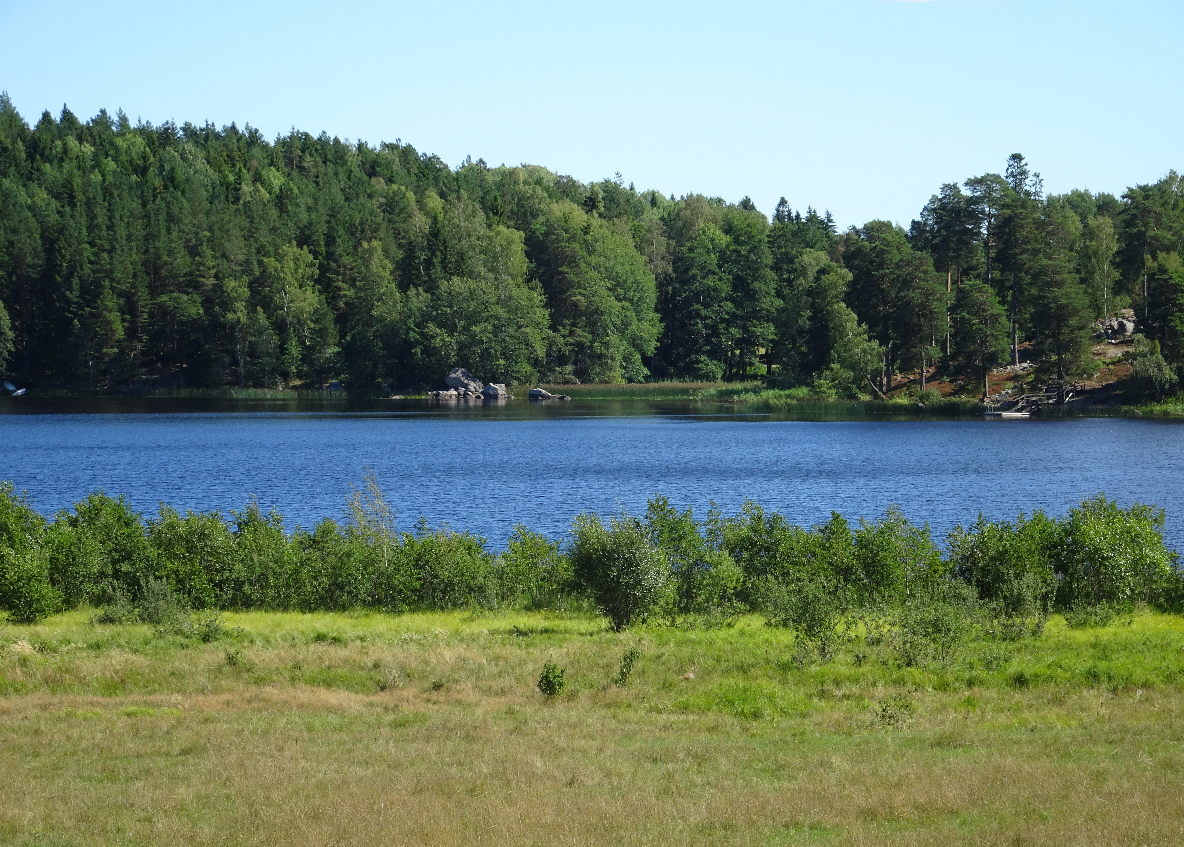 Losjön, Roslags-Kulla